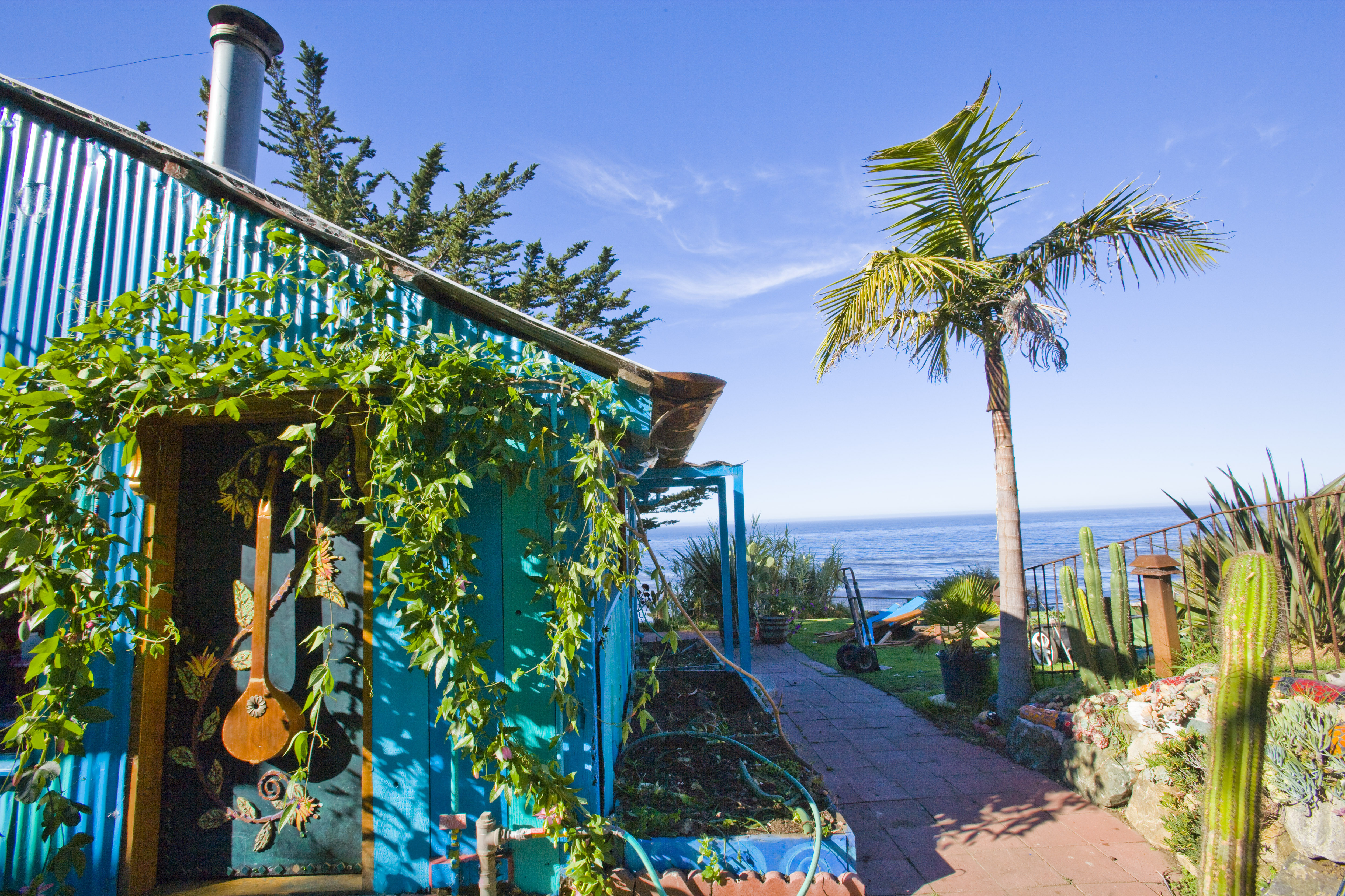 Art Barn